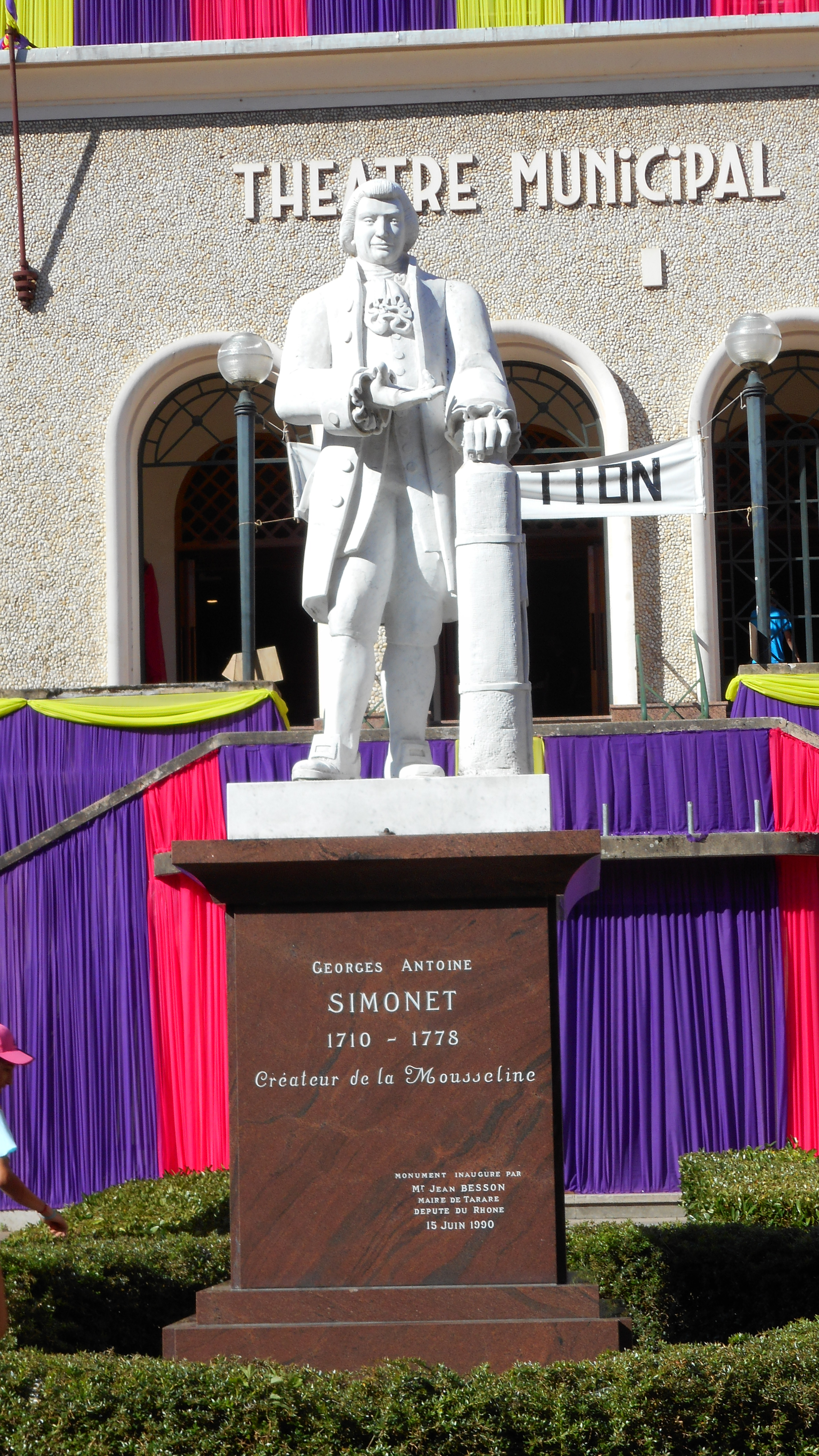 Fête des Mousselines 2015 à Tarare (Rhône)